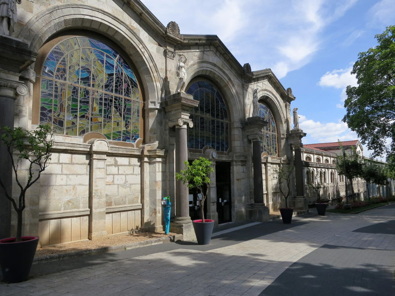 Thermes de Royat (architechte : Agis-Léon Ledru)